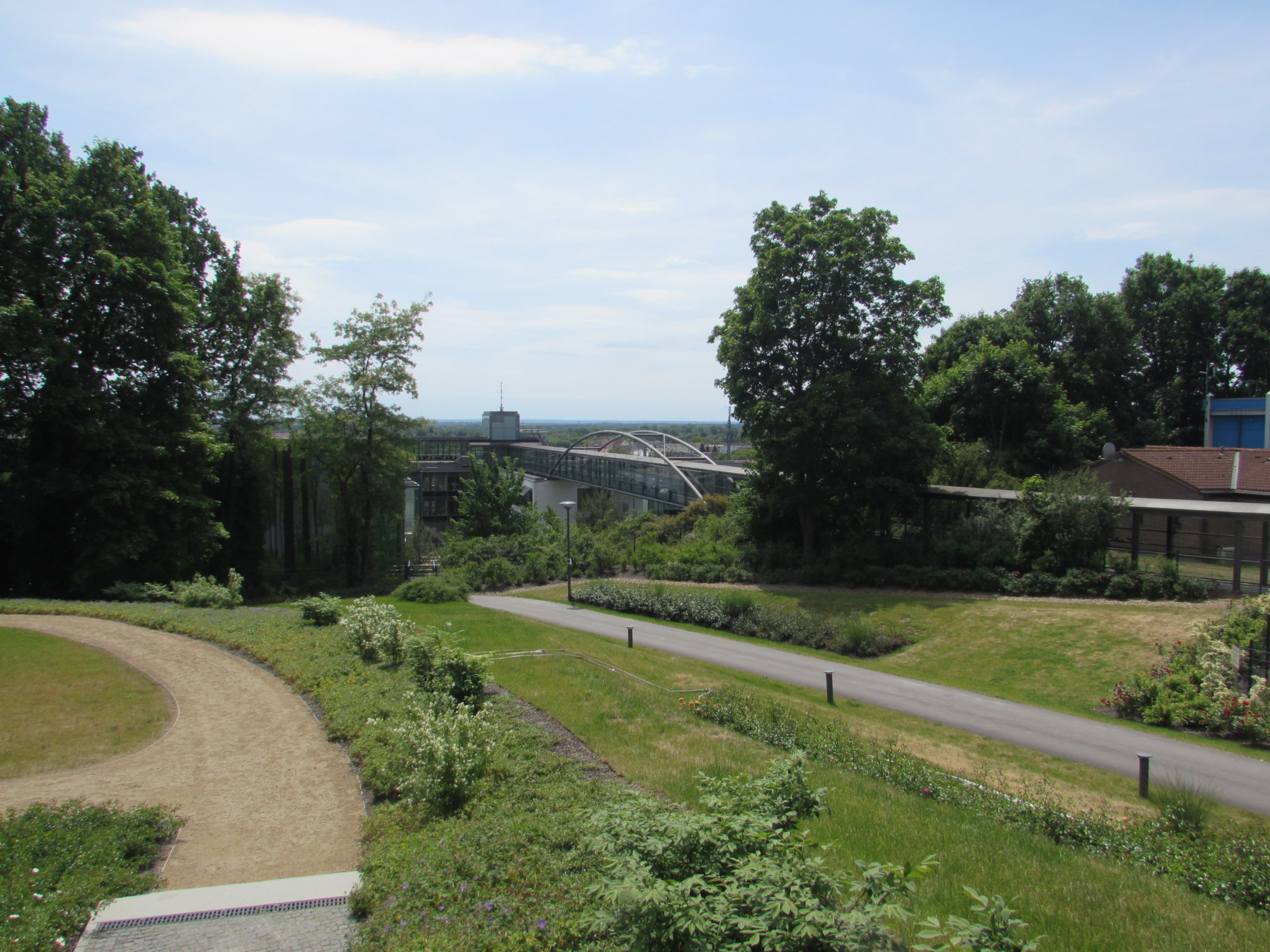 übergang vom flugplatz des rettungshubschraubers zum städtischen klinikum brandenburg